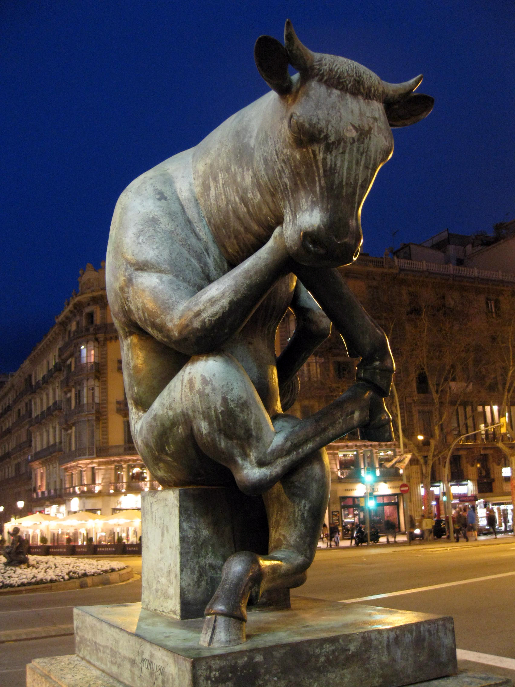 Meditació (Josep Granyer). Rambla Catalunya amb Gran Via de les Corts Catalanes (Barcelona)